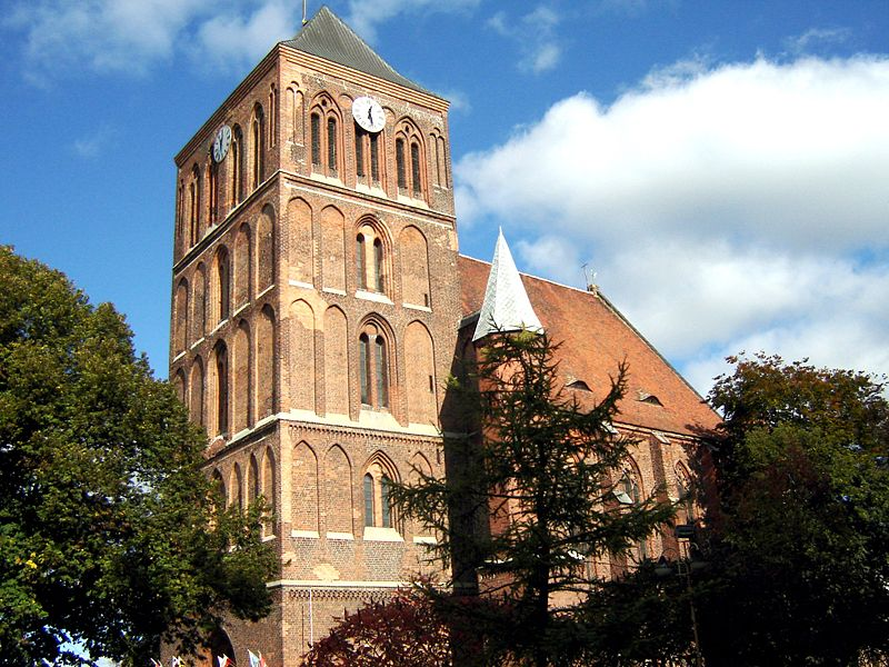 Kościół Gotycki (Choszczno)